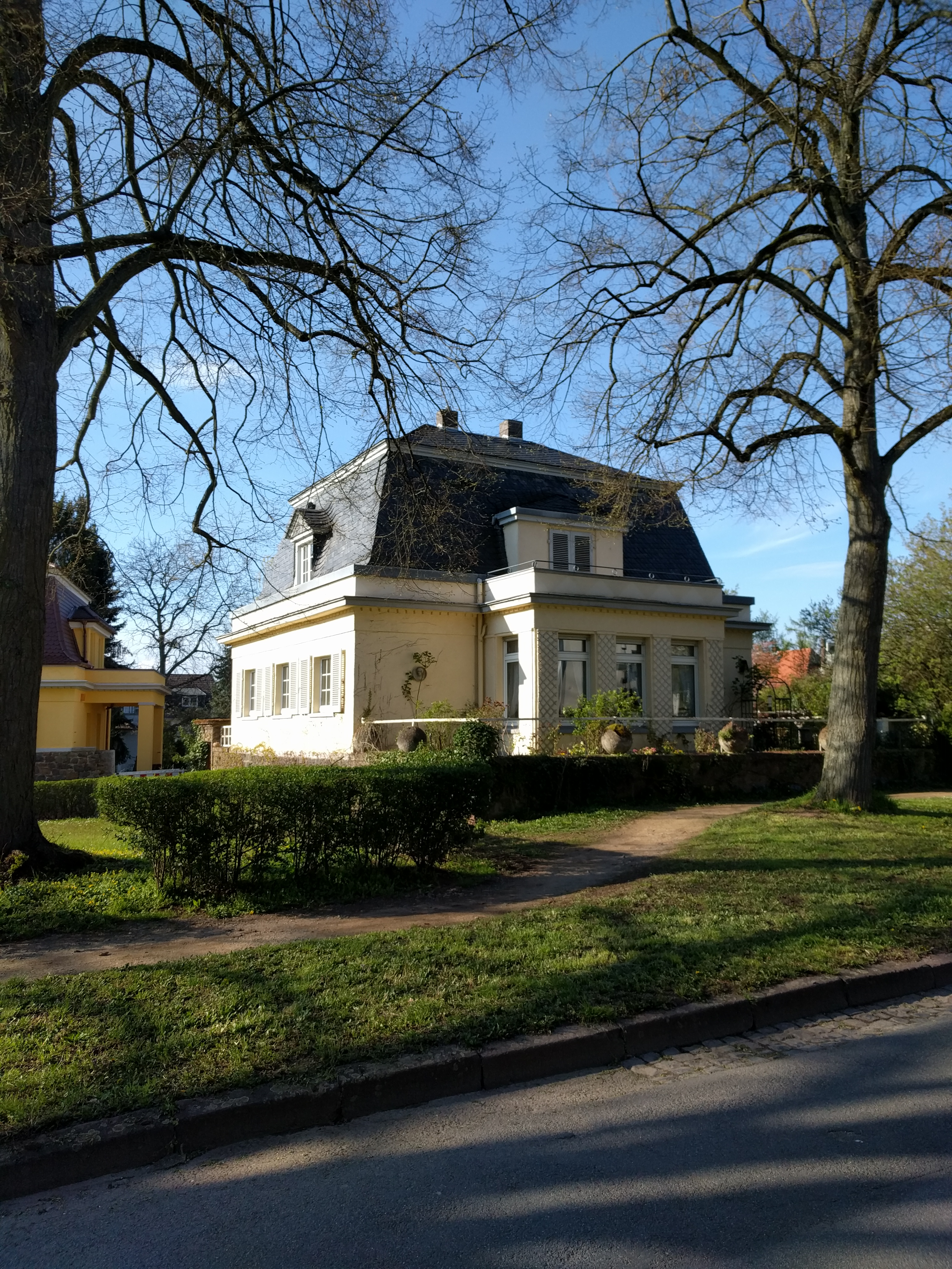 Komponistenviertel, 64287 Darmstadt, Germany